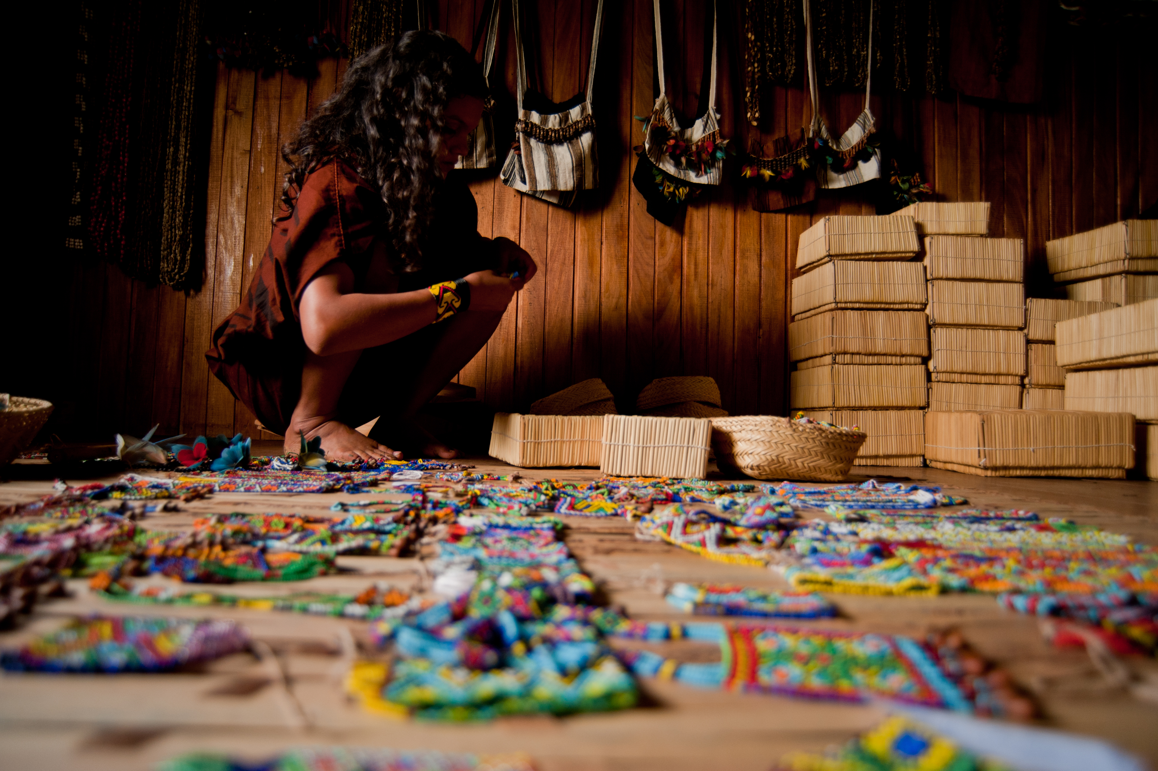 Cooperativa Indígena Ashaninka Aldeia Apiwtxa Acre, Brasil © Pedro França/MinC